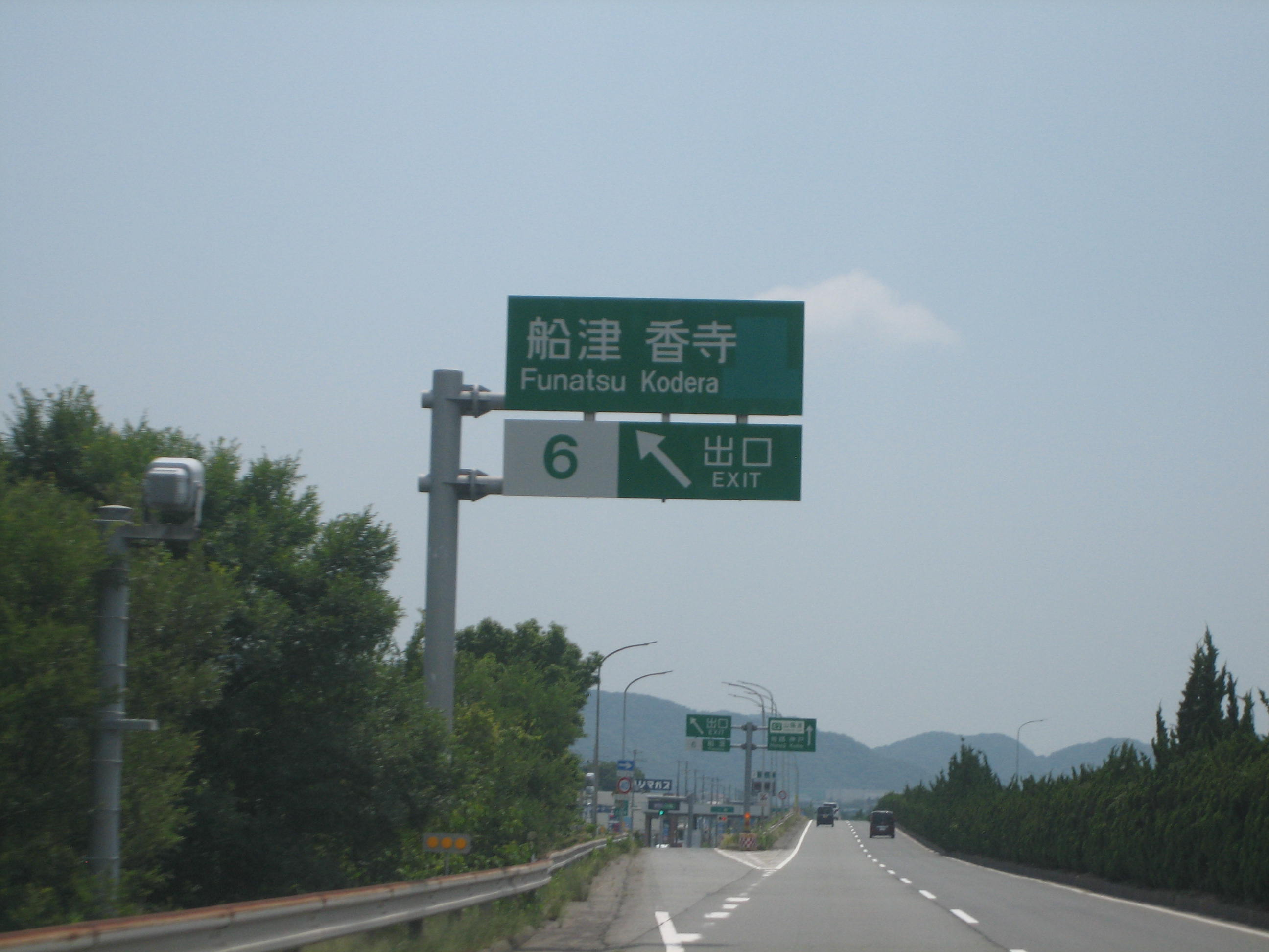 船津IC